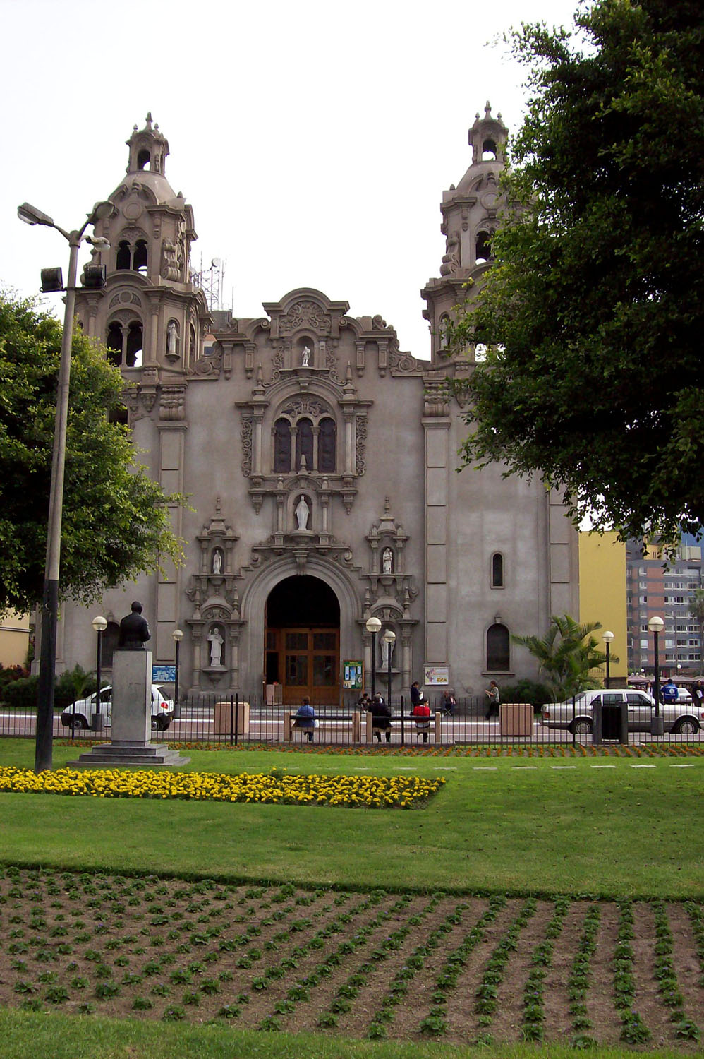 iglesia medalla milagrosa Miraflores Peru